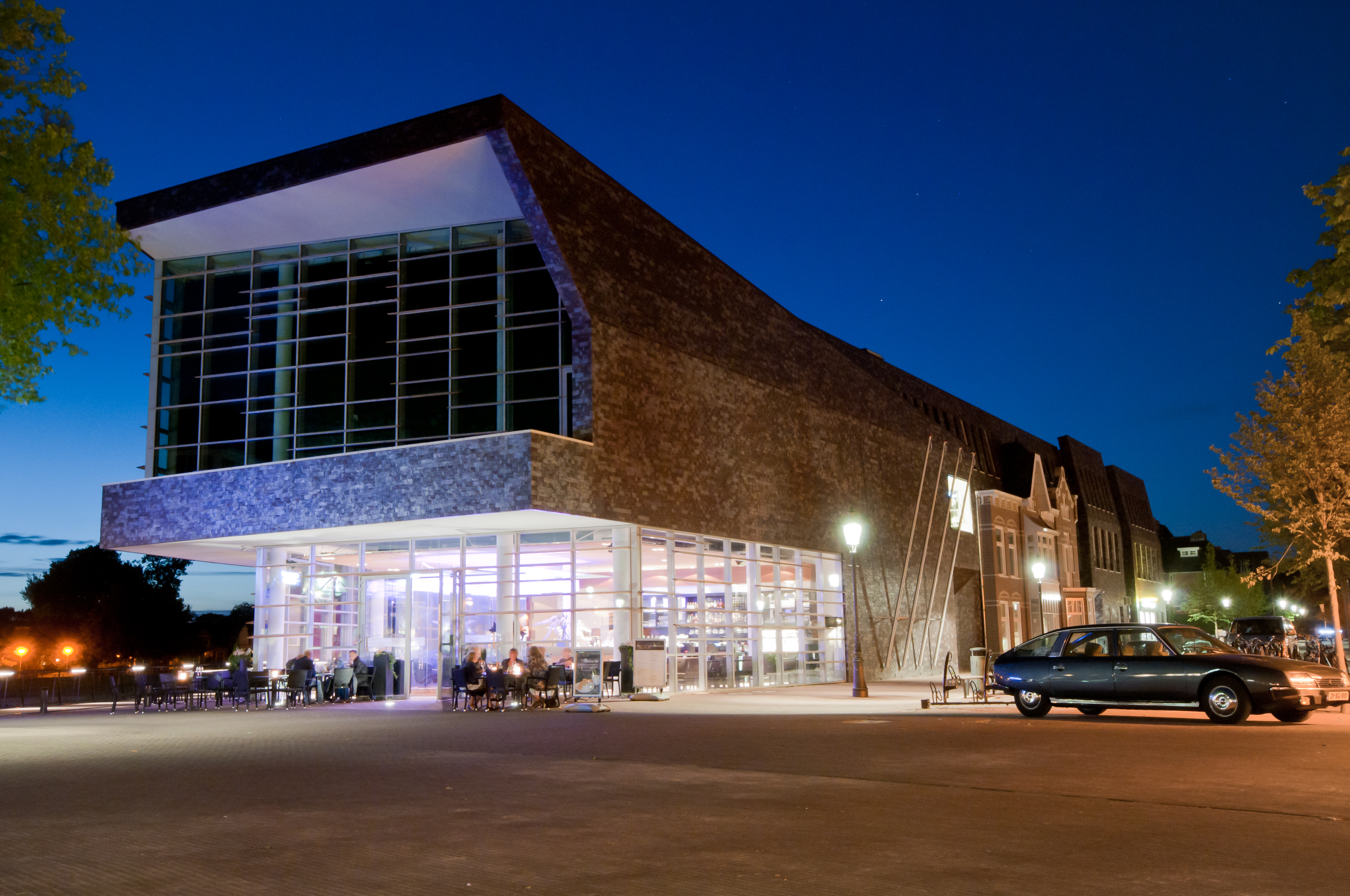 Het Hof van Coevorden is een Grand Café, raadszaal, Centrum voor de Kunsten, trouwzaal, balie voor gemeentediensten en theaterzaal.